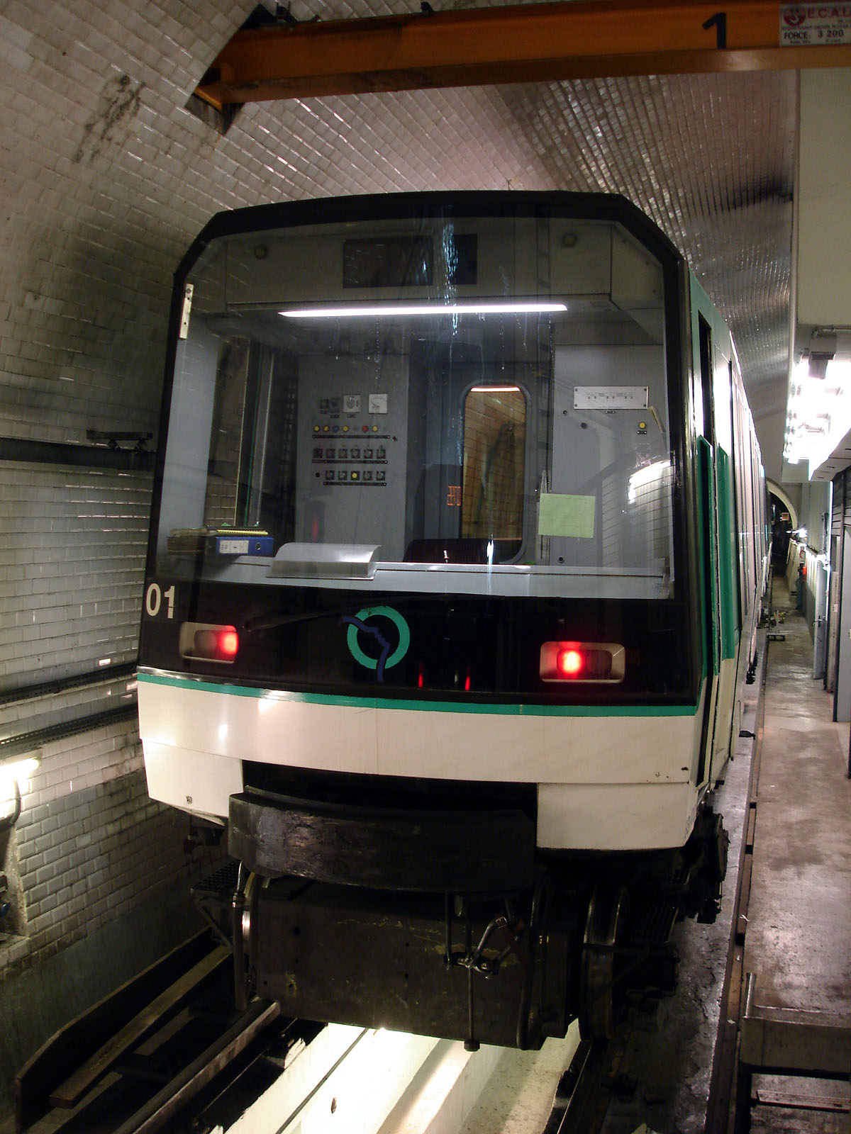 Station Pré-Saint-Gervais de la ligne 7 bis du métro de Paris, France.